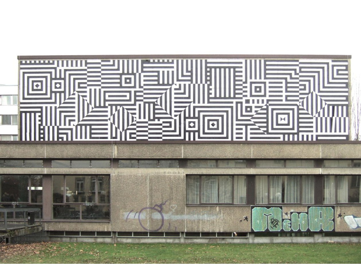 Fassade des Bonner Juridicums von Victor Vasarely Entwurf: 1965 Ausführung: 1969 Technik: Feuer-Emaille Größe: 6 x 12 m